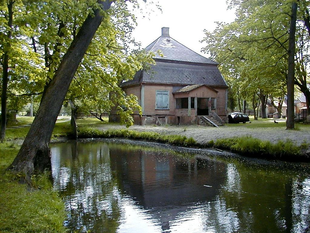 Nordeķu muiža Rīgā. 2004-05-30